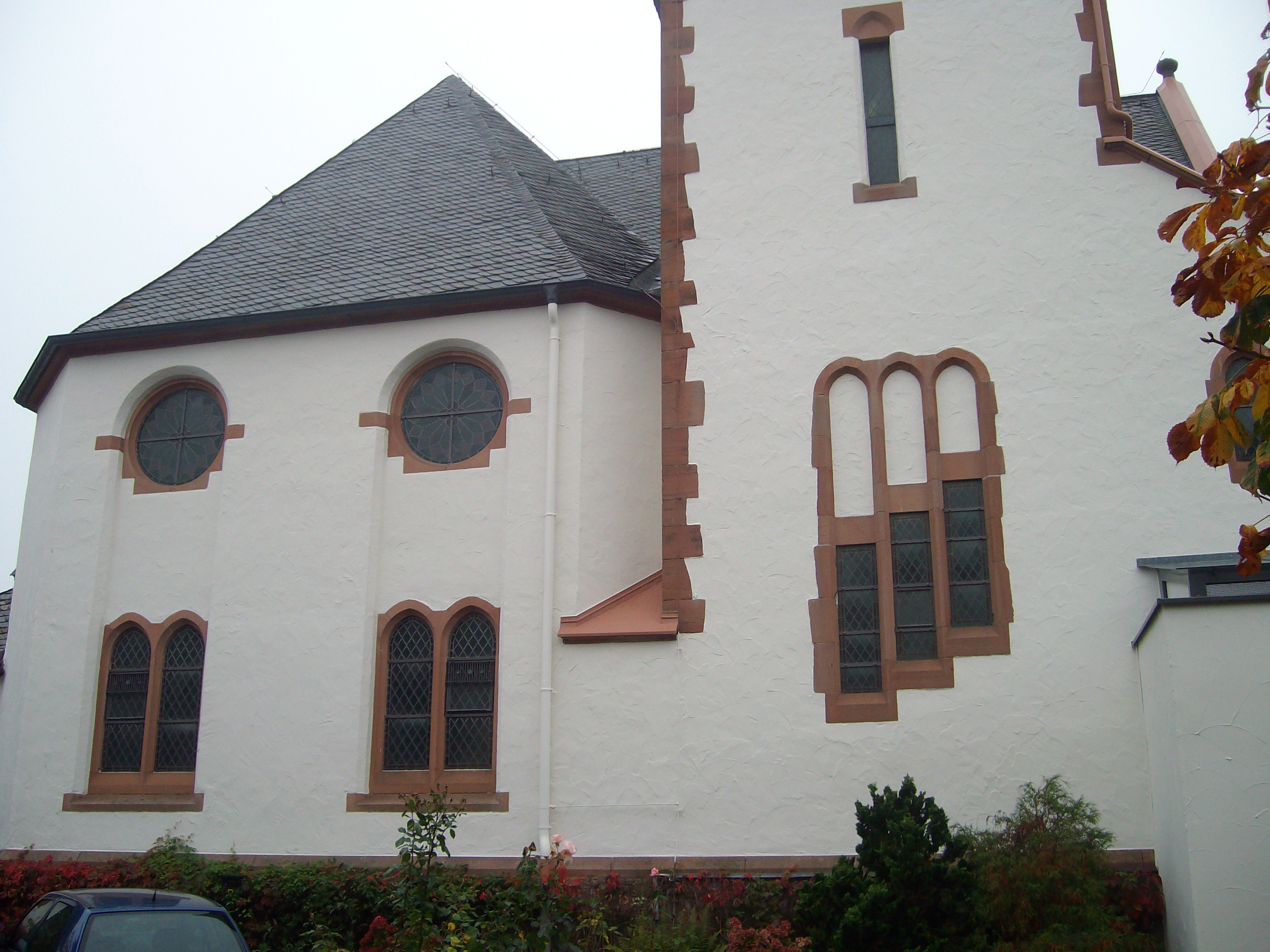 Evangelische Kirche Fellingshausen, Biebertal, Landkreis Gießen, Hessen, Deutschland